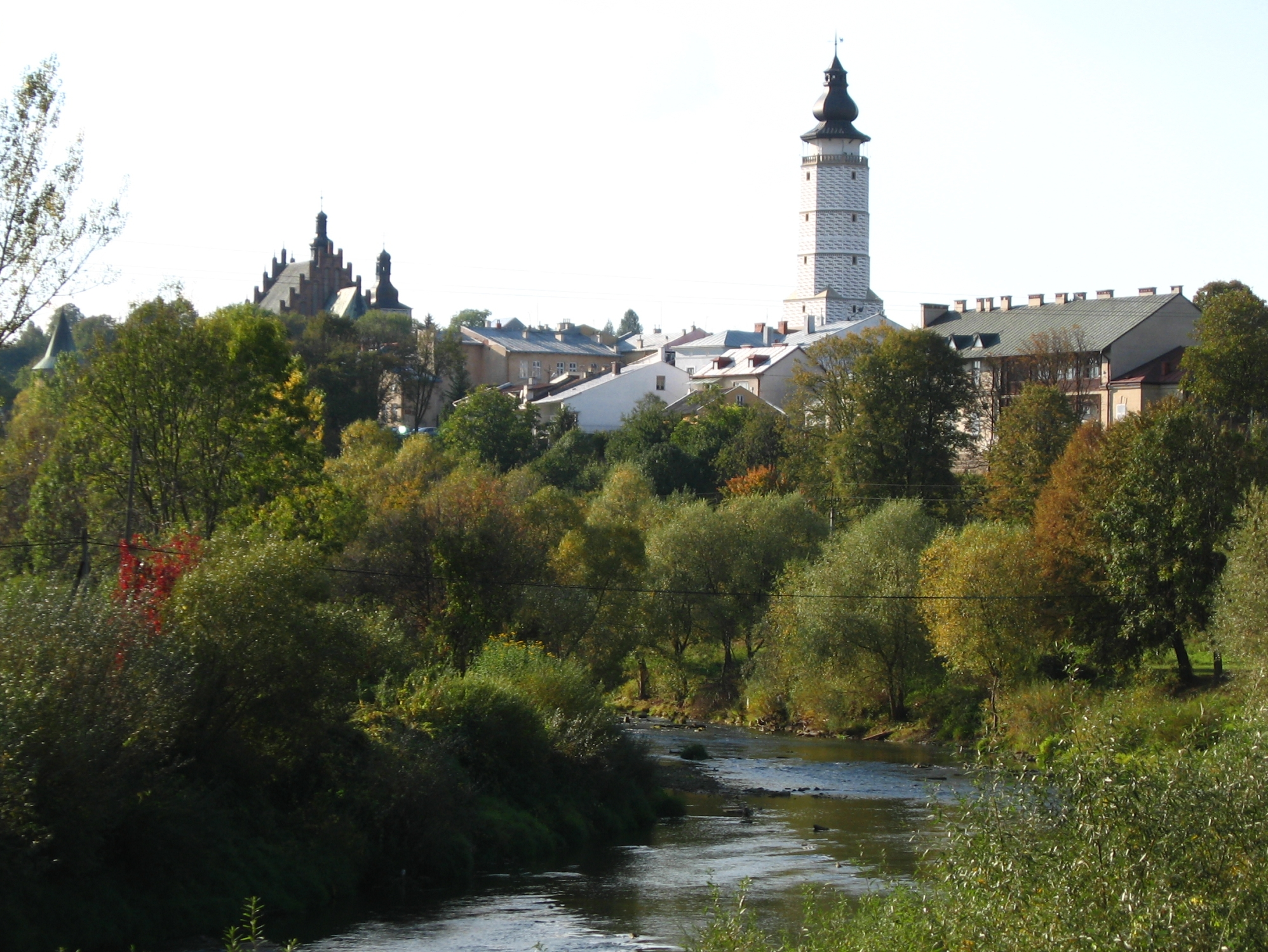 Panorama Biecza